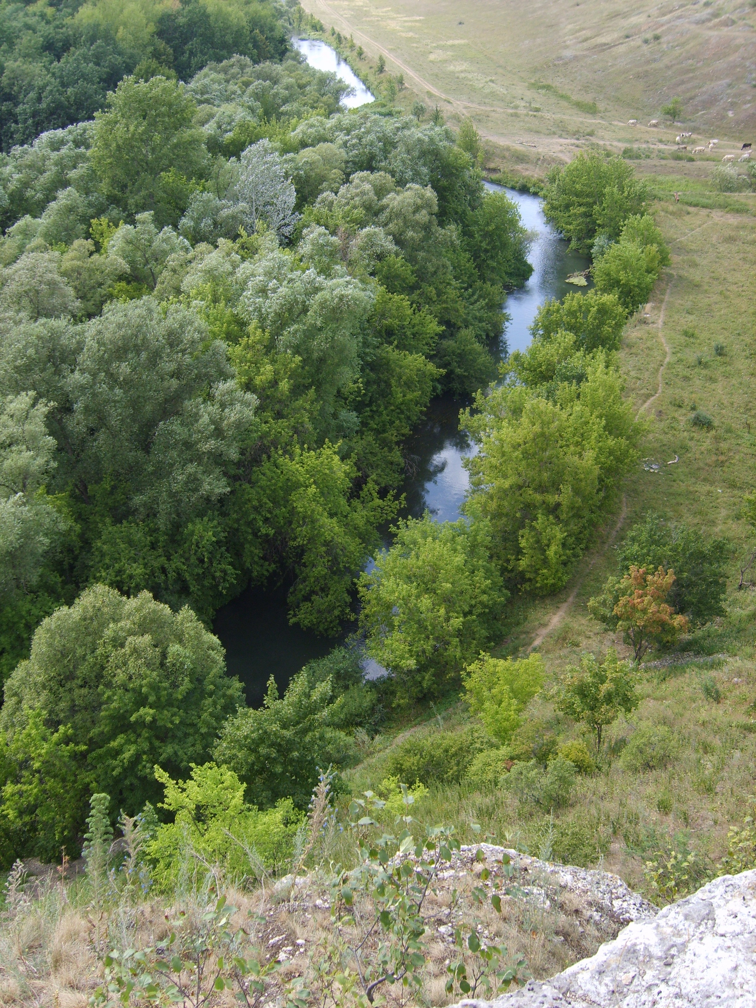 Вид на реку Воргол со скалы "Копченый камень" (Липецкая область, Елецкий район, окрестности деревни Дерновка)